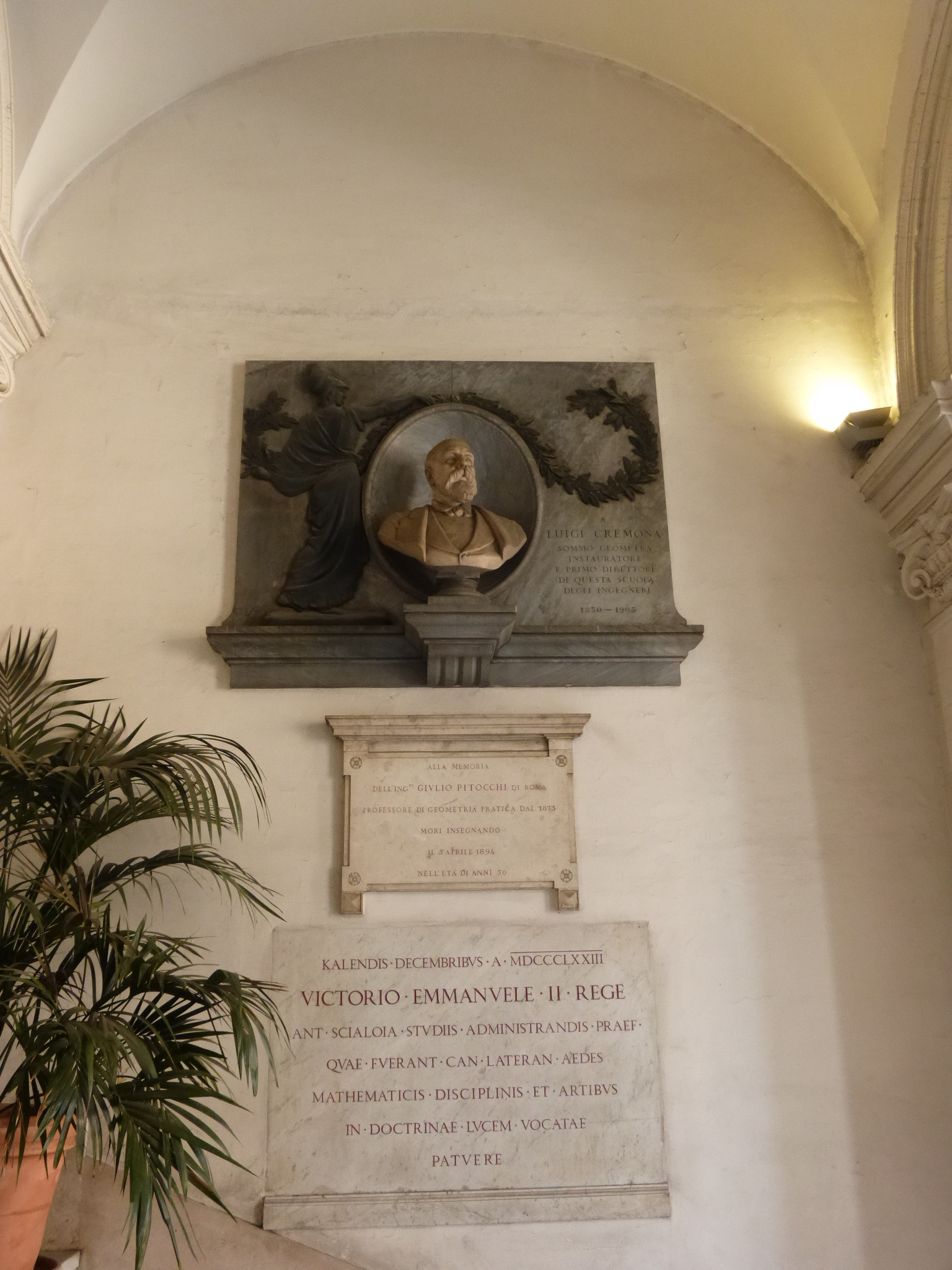 Roma, Facoltà di Ingegneria a S. Pietro in Vincoli, memorie nell'androne d'ingresso.